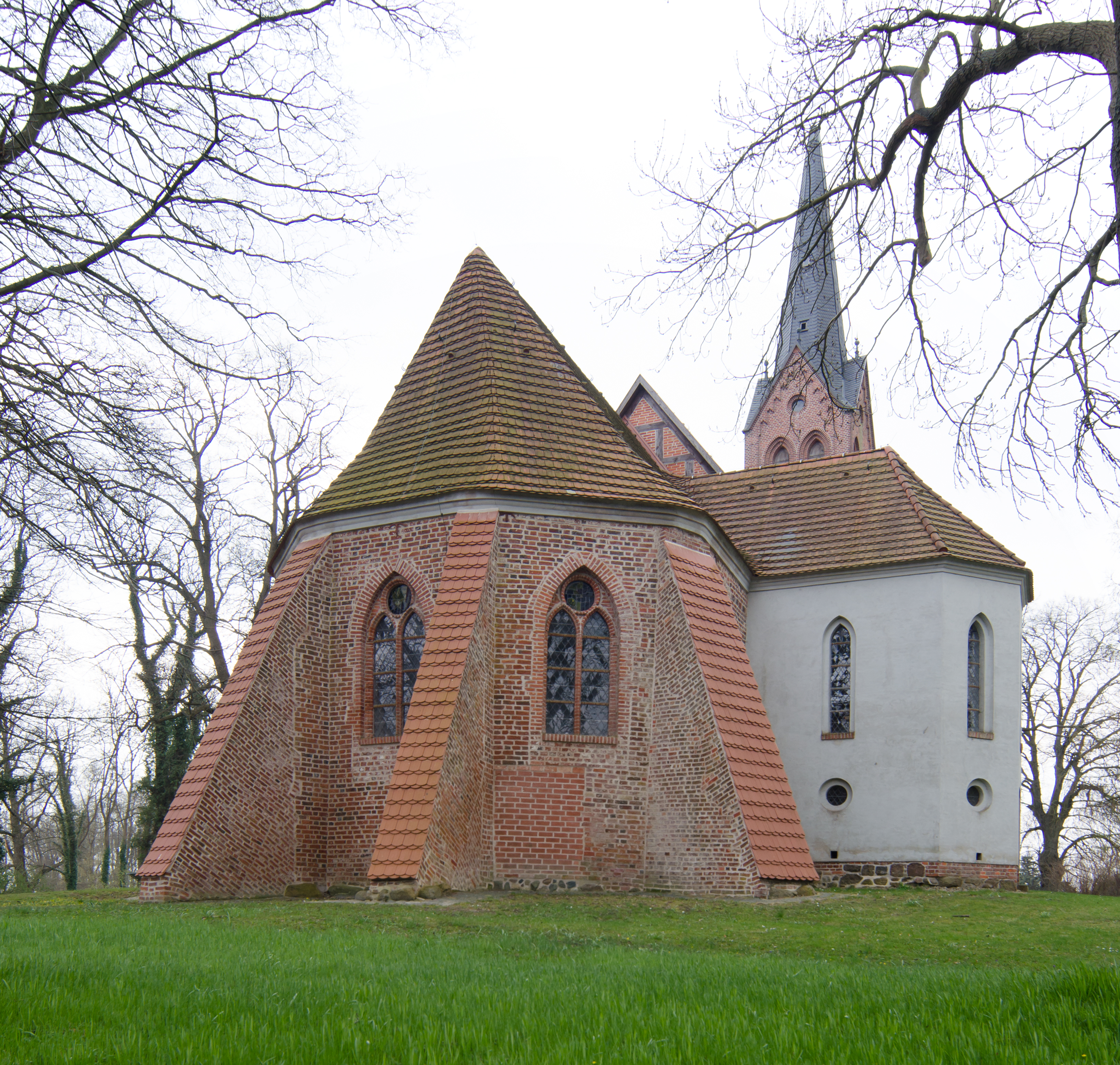 Krummin St, Michael